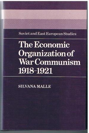 Silvana Malle - The Economic Organization of War Communism 1918—1921 (1985, cover)